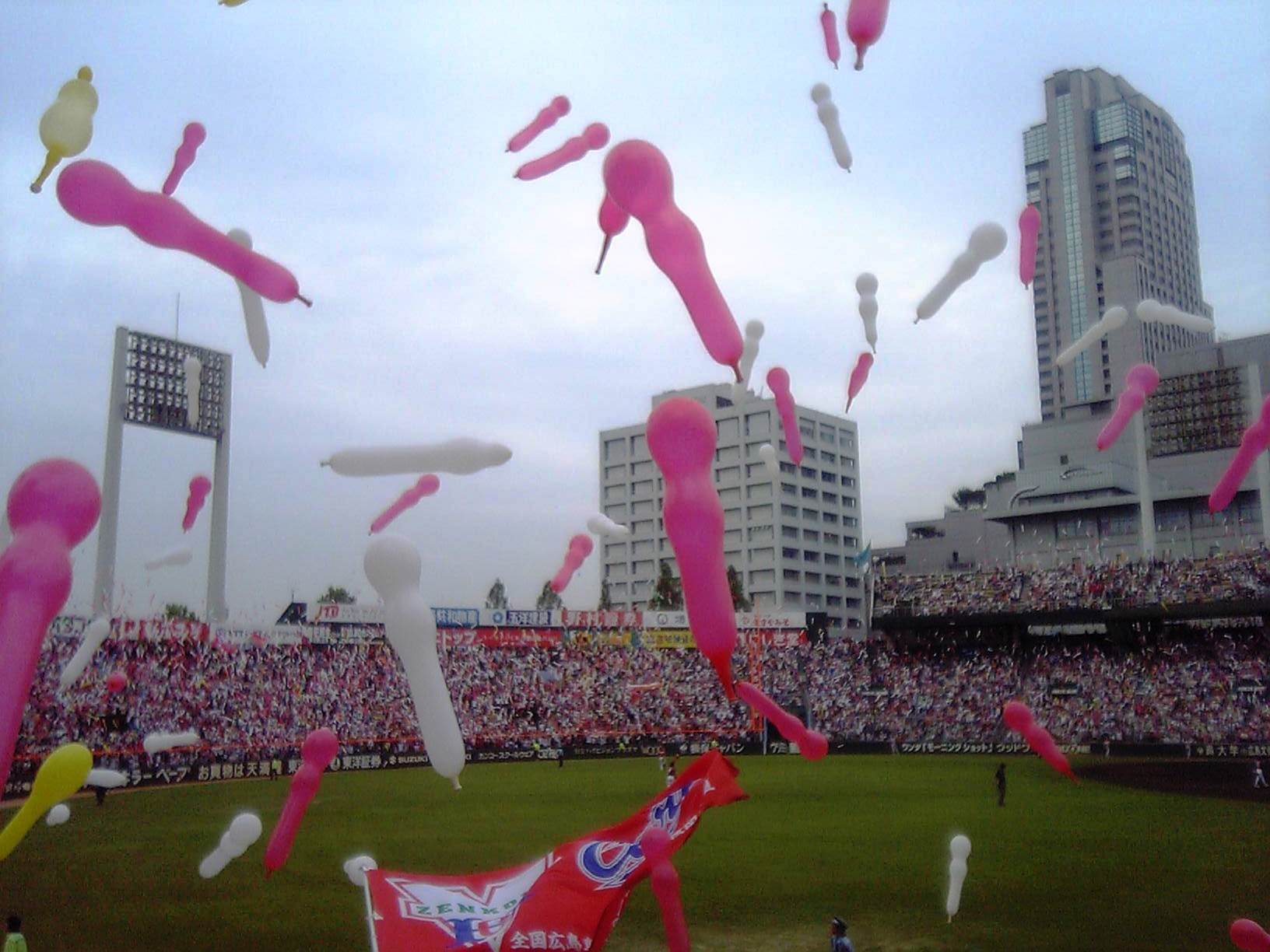 2005年5月21日、本人撮影 広島市民球場、ジェット風船 2005年5月23日 (月) 20:16 . . Taisyo . . 680×510 (67,607 バイト)